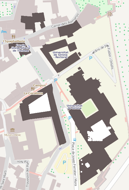 Campus del Barri vell de la Universitat de Girona This map may be incomplete, and may contain errors. Don't rely solely on it for navigation.